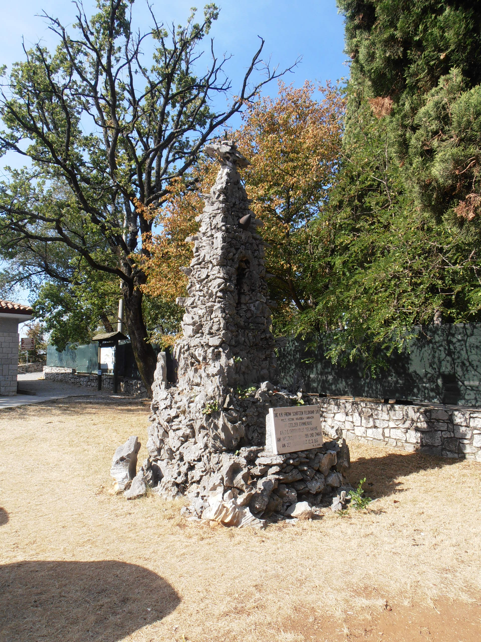 Italy - Sistiana - Schützen Denkmal. Platte: DIE K.K. FREIW SCHÜTZEN FELKOMP 3/II POLIT. BEZIRK VOLOSCA - ABBAZIA IN STOLZER ERINNERUNG AN DIE EHRENVOLLE TEILNAHME AM WELTKRIEGE 1914-1916 UND ZWAR AN DER ISONZOFRONT 12.3.1916